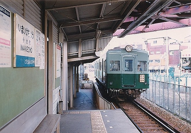 南海天王寺支線今池町駅に進入する1521系 1991年1月8日 Bakkai撮影 フィルムカメラで撮影した写真を本人がスキャン